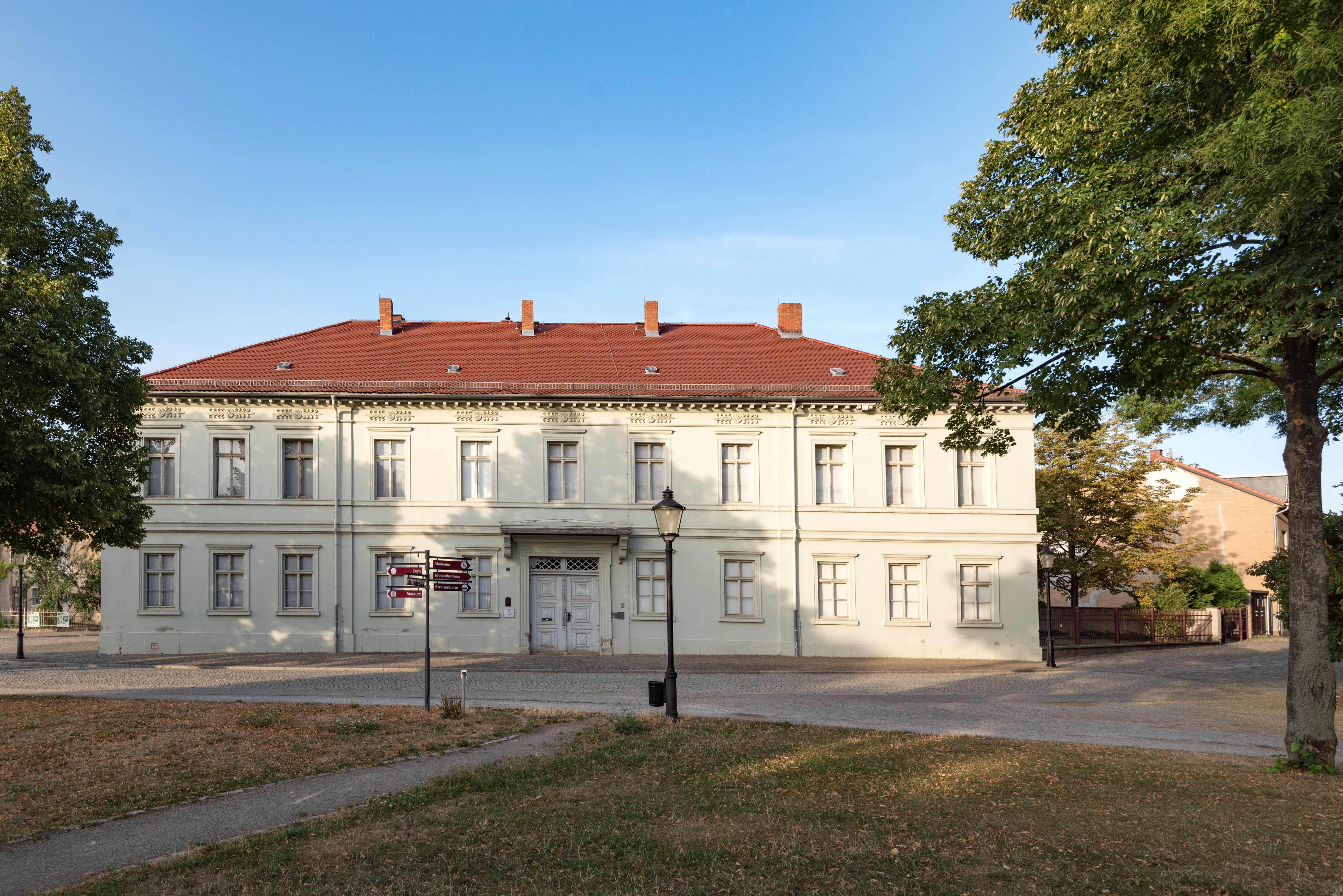 Naumburg (Saale), Kramerplatz 1